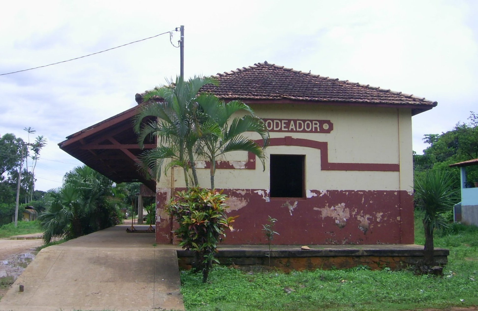 Antiga estação ferroviaria de Rodeador